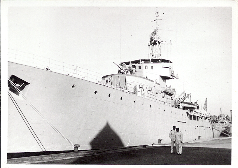 Corbeta Española Princesa (F-62), de la clase Descubierta (1955), en Cartagena.